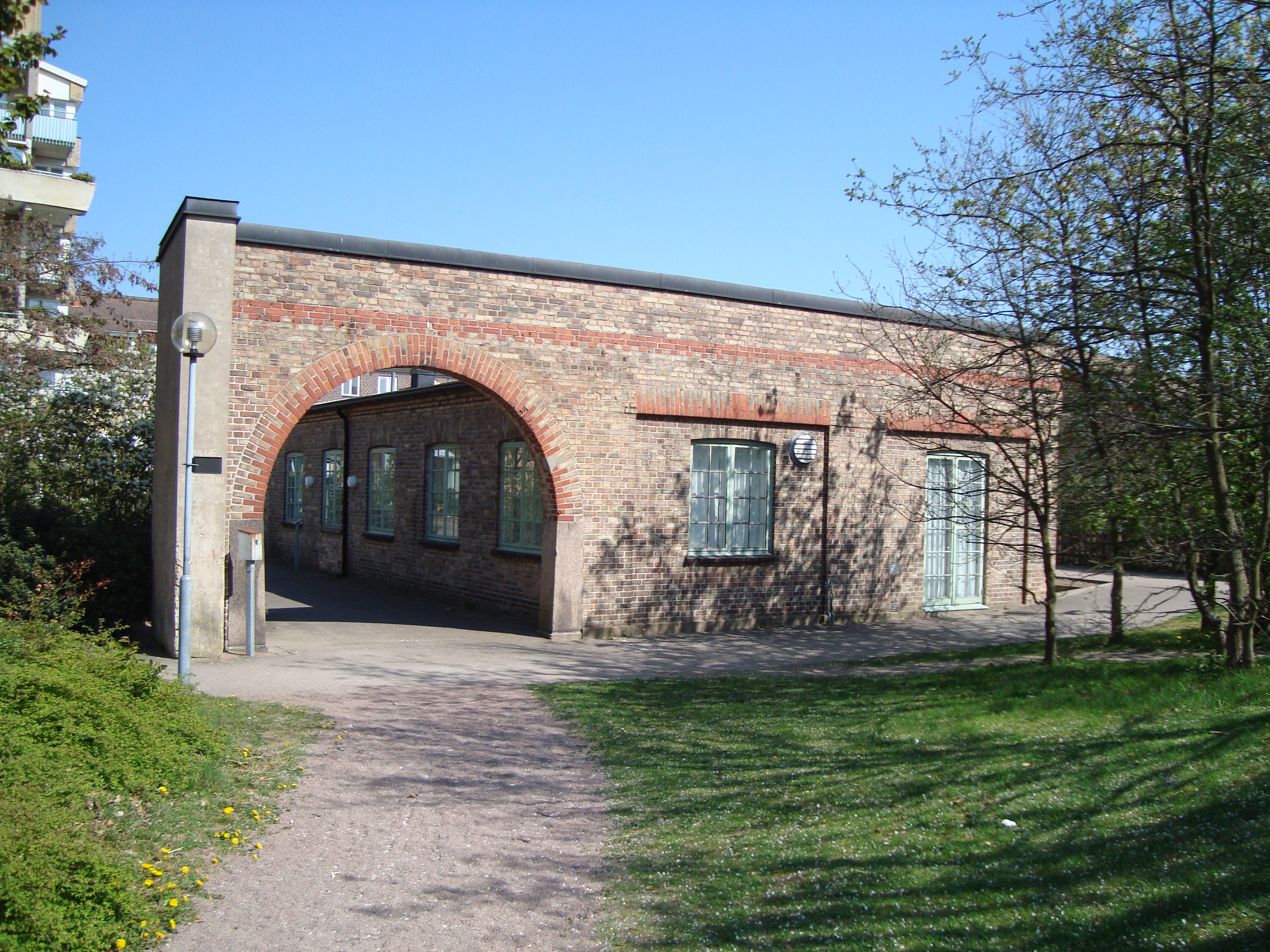 Enda kvarvarande resten av Jaquardväveriet i Raus plantering i Helsingborg.